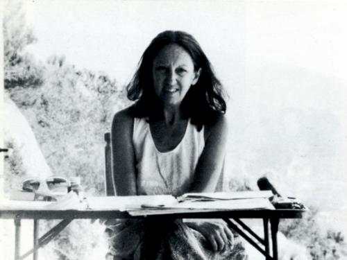 Carla Lonzi (1931-1982) Fonte: Autore sconosciuto Anno: ante 1983